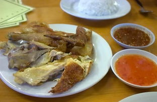 Gai yang mit Klebreis und Saucen.